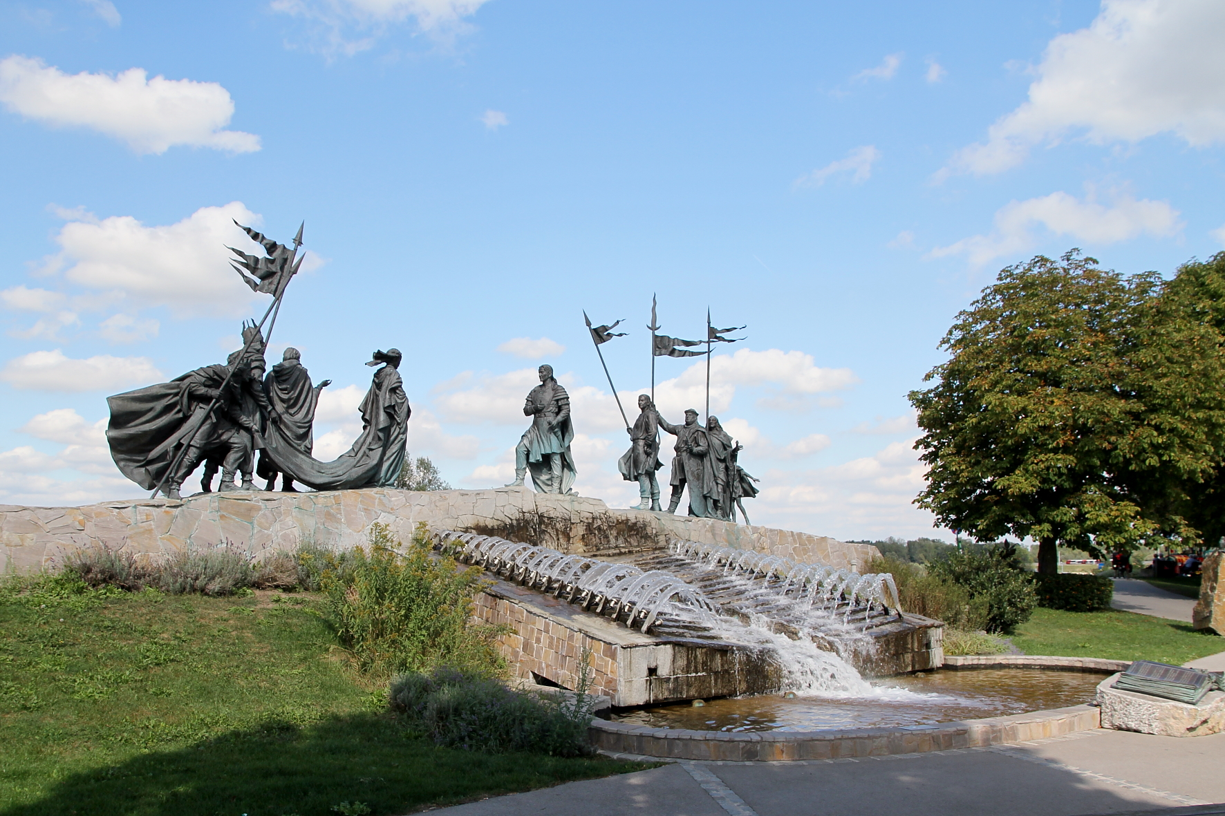 Der Nibelungenbrunnen in der niederösterreichischen Stadt Tulln an der Donau ist eine Gestaltung der Szene "Begegnung von Kriemhild, der Burgunderkönigin, und dem Hunnenkönig Etzel in Tulln" in Form einer Bronzeskulpturen-Dokumentation, geschaffen vom Bildhauer Michail Nogin. Der Brunnenbildhauer Hans Muhr ergänzte das Kunstwerk mit einer integrativen und ästhetischen Licht-Wasser-Sein-Komposition.